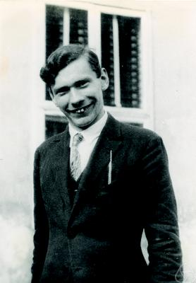 Foto di Hans Hornich